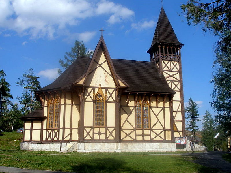 Kostol Nepoškvrneného počatia Panny Márie v Starom Smokovci je postavený vo vysokohorskom alpskom štýle so svojím charakteristickým hrázdeným murivom v neogotickom štýle. Kostol dal postaviť spišský biskup Juraj Császka na žiadosť arcikňažnej Klotildy v roku 1888. Projekt vyhotovil architekt Gedeon Majunke zo Spišskej Soboty. Slávnostná posviacka kostola sa uskutočnila 26. augusta 1888.